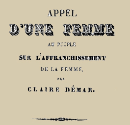 extrait colorisé page de titre : Appel d'une femme au peuple sur l'affranchissement de la femme par Caire Démar